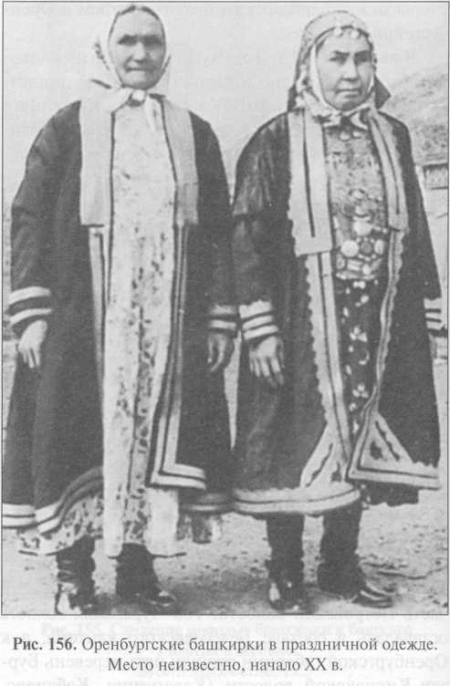 Оренбургские башкирки в праздничной одежде. Нач. ХХ в.